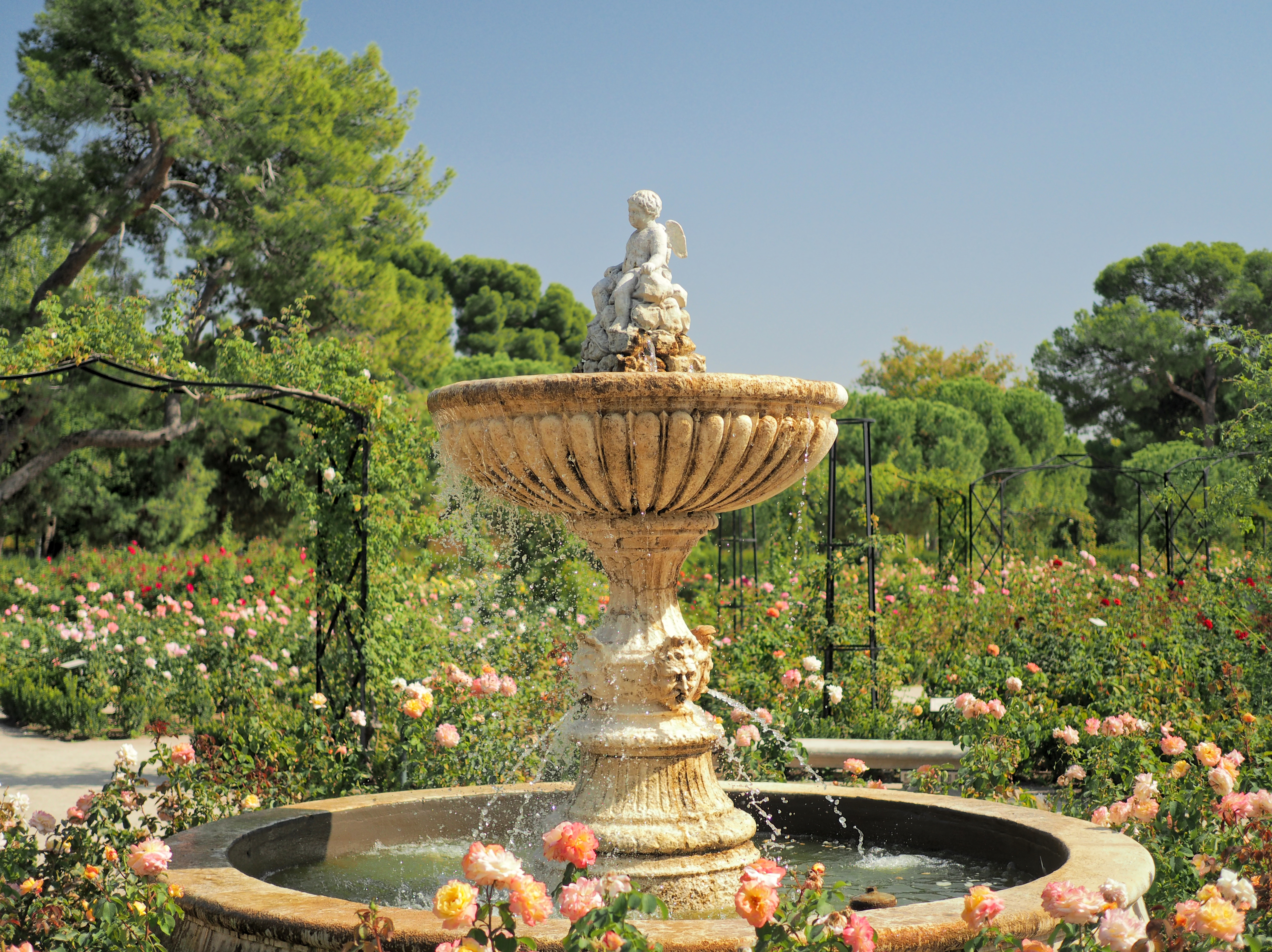 Madrid, El Retiro